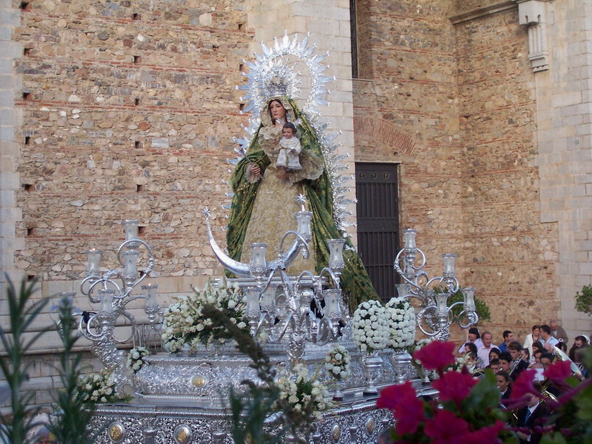 Procesion de la Virgen del Rosario en la Plaza Alta de Aracena Huelva. Año 2009